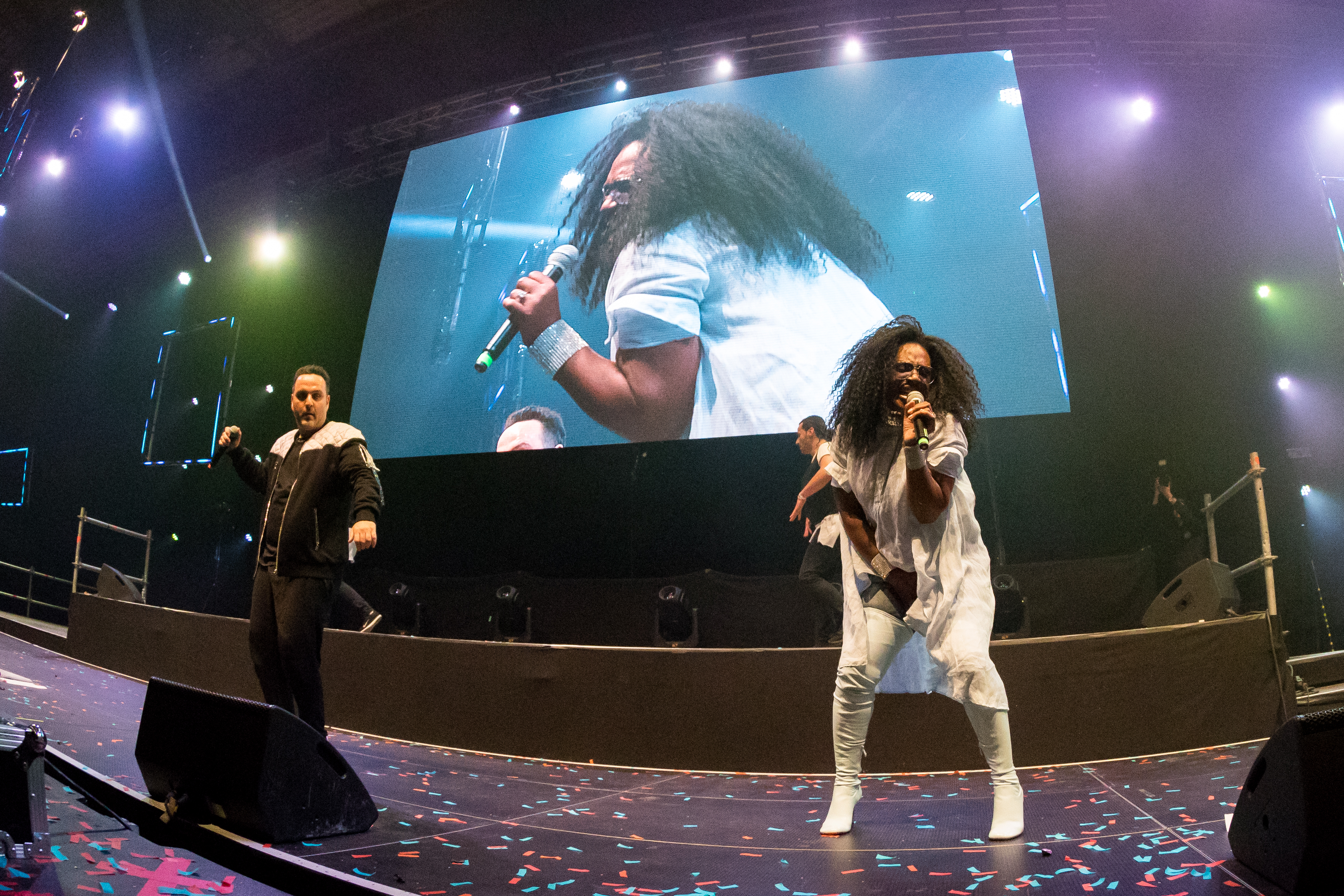 Culture Beat during Sunshine Live - Die 90er Live on Stage at Maimarkthalle & Maimarktclub, Mannheim, Baden-Württemberg, Germany on 2017-11-26, Photo: Sven Mandel